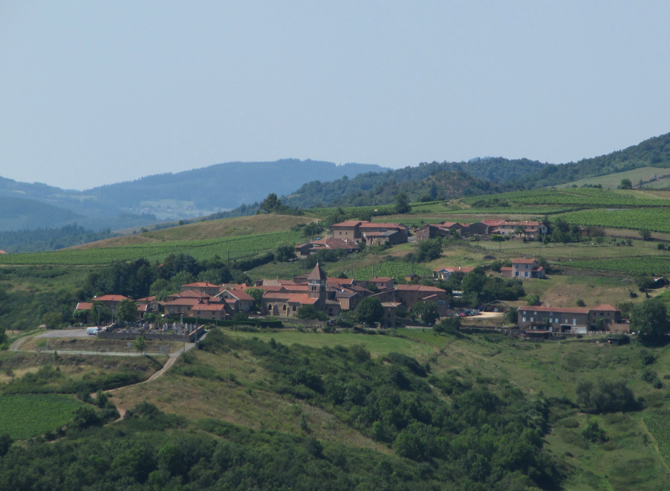 Sainte-Paule